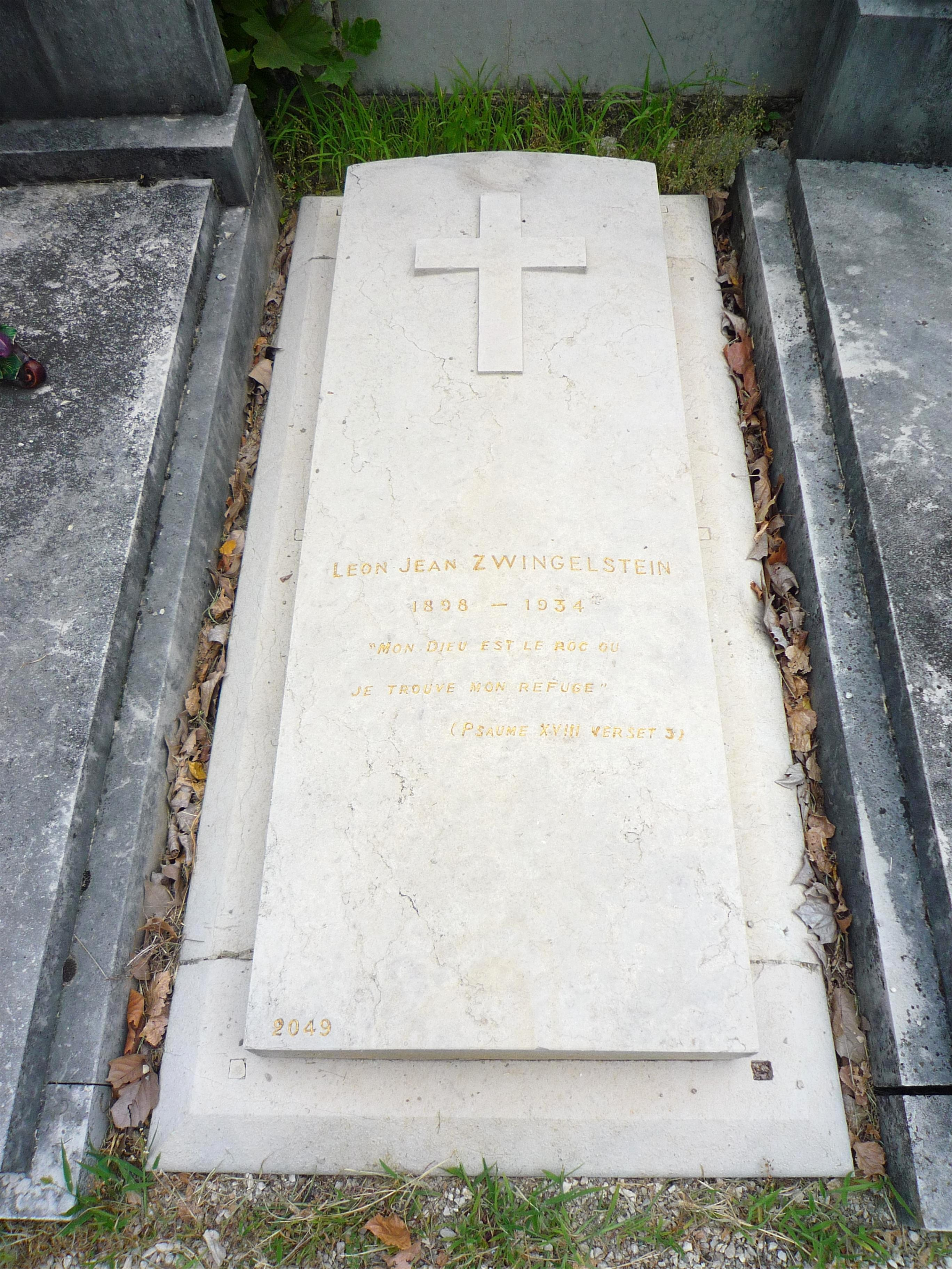 Tombe de l'alpiniste grenoblois Léon Zwingelstein (1898-1934). Cimetière Saint-Roch, carré 21, rang 1 latéral, tombe 2049.